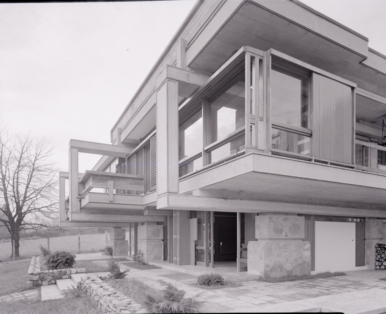 Servizio fotografico : Italia, 1961 / Paolo Monti. - Buste: 25, Fototipi: 26 : Negativo b/n, gelatina bromuro d'argento/ pellicola ; 10x12. - ((Serie costituita da 25 buste di negativi identificati con i nn.: 2931, 2932, 2933, 2934, 2935, 2936, 2937, 2938, 2939, 2940, 2941, 2942, 2943, 2944, 2945, 2946, 2947, 2948, 2949, 2950, 2951, 2952, 2953, 2954, 2955, 2956, e tenute insieme da una graffetta. - Le buste sono numerate da 33 a 56. - Alcuni negativi presentano segni di degrado (gelatina raggrinzita, bolle e alterazione tonale). - Fonte: Rubrica di Paolo Monti: Archivio 10x12 (ultimi numerati) - dal G1 al (s.d.), presso Archivio Paolo Monti